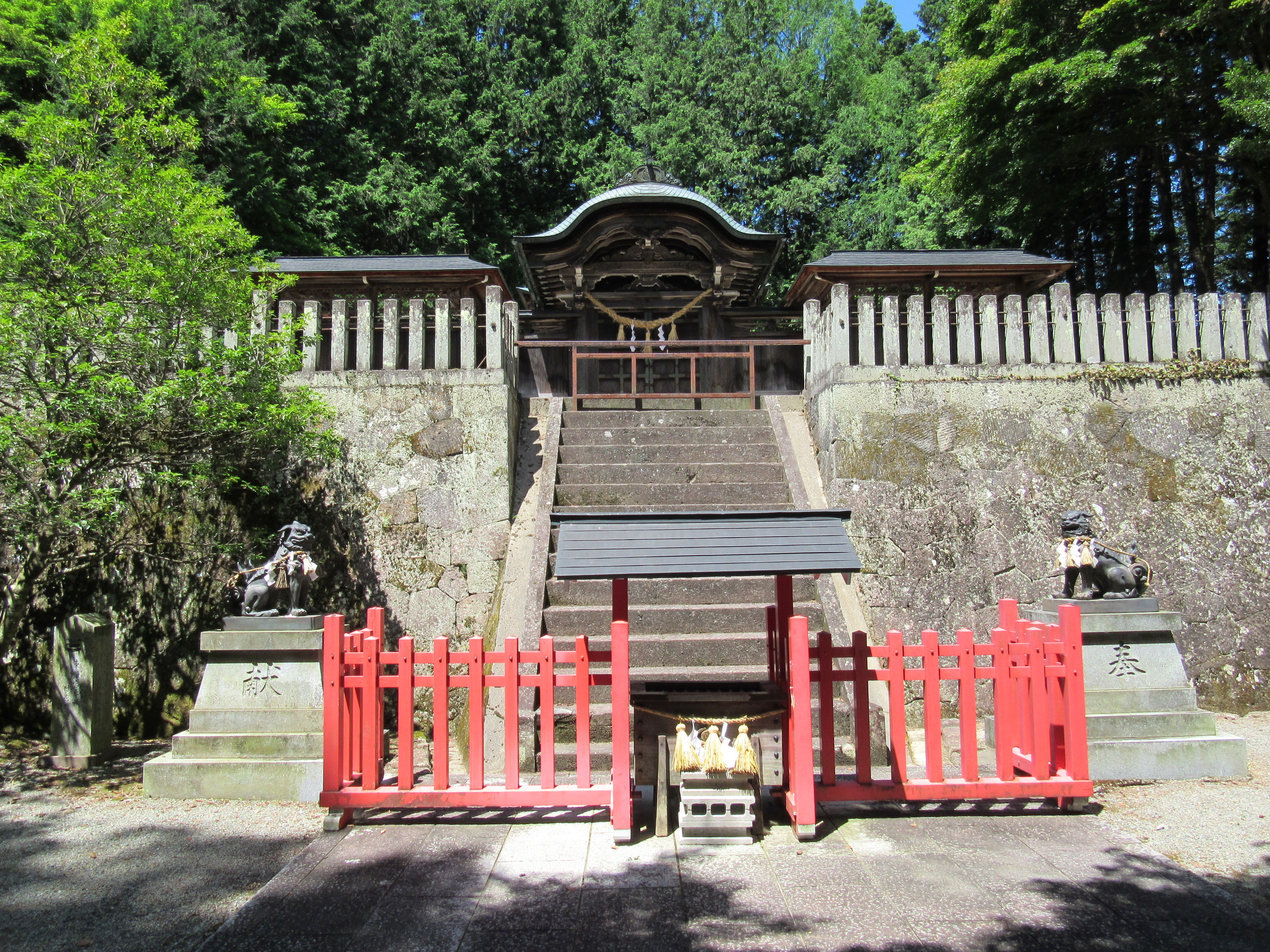 飛騨東照宮